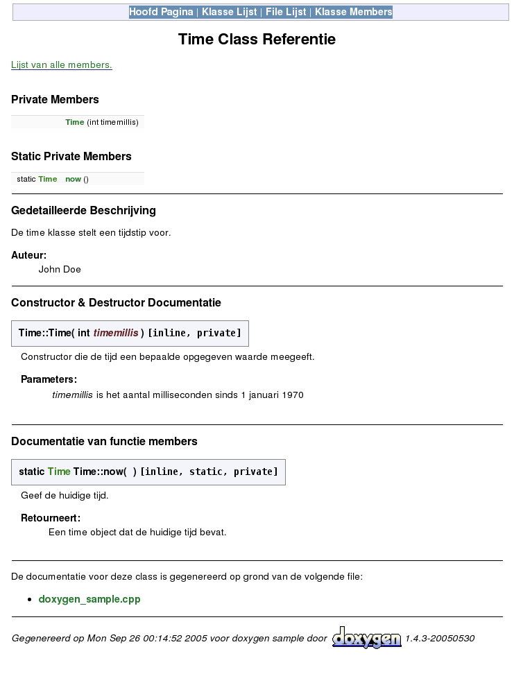 Screenshot HTML pagina gecreëerd door Doxygen